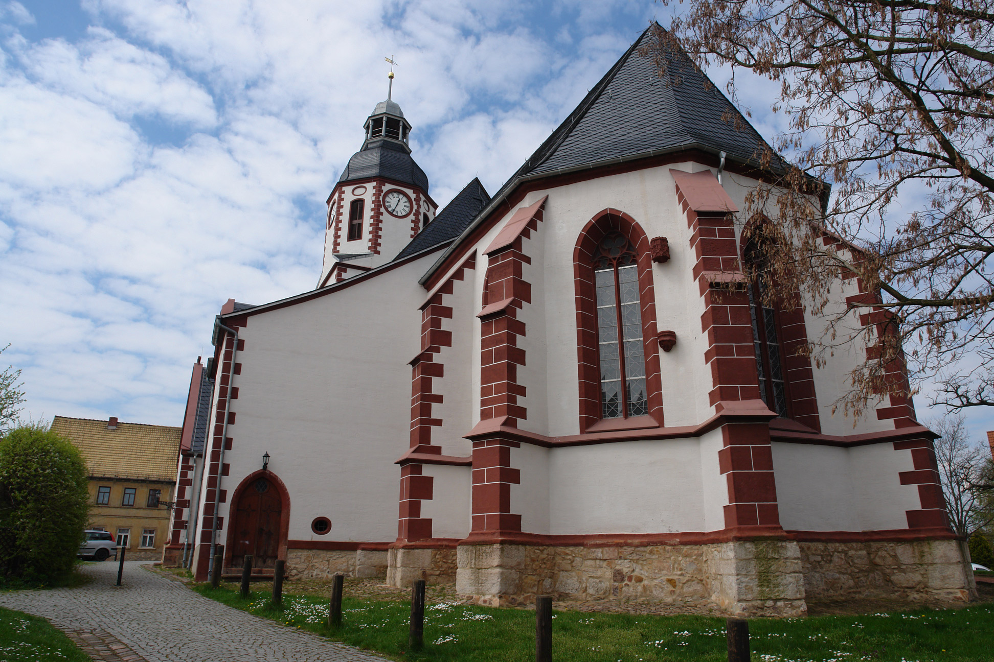 Kirche St. Michaelis (1233) in Frohburg, Sachsen